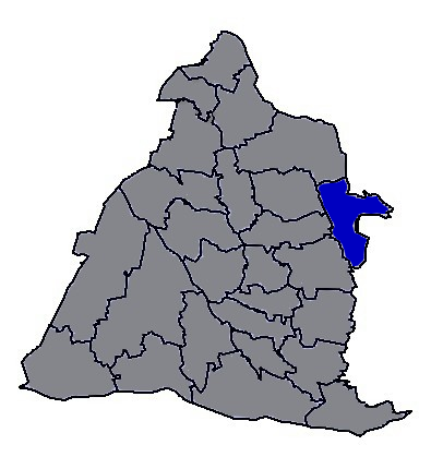 臺灣省彰化縣芬園鄉。